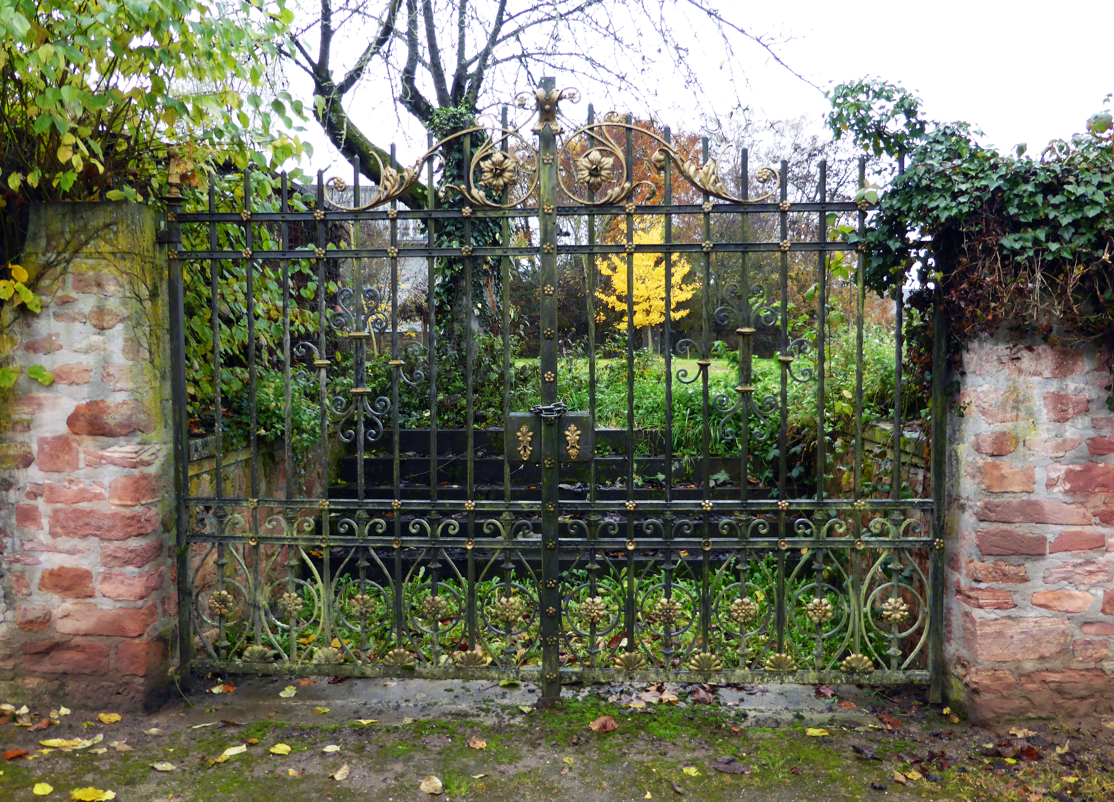 Gartentor der Wasserburg Seligenstadt